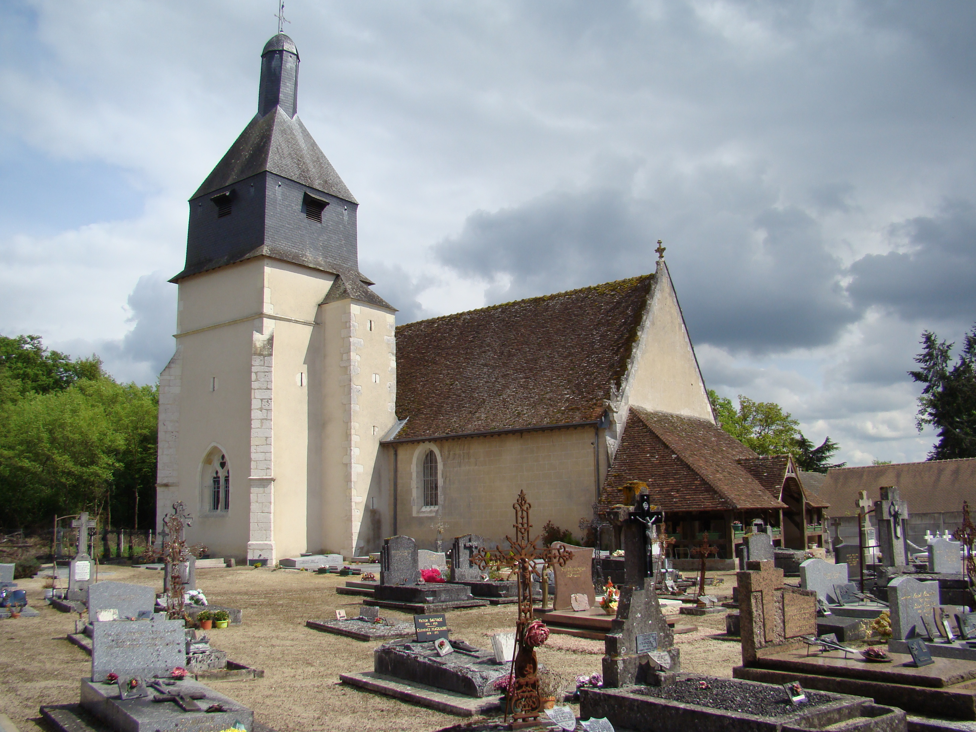 Veilleins (Loir-et-Cher) : l'église